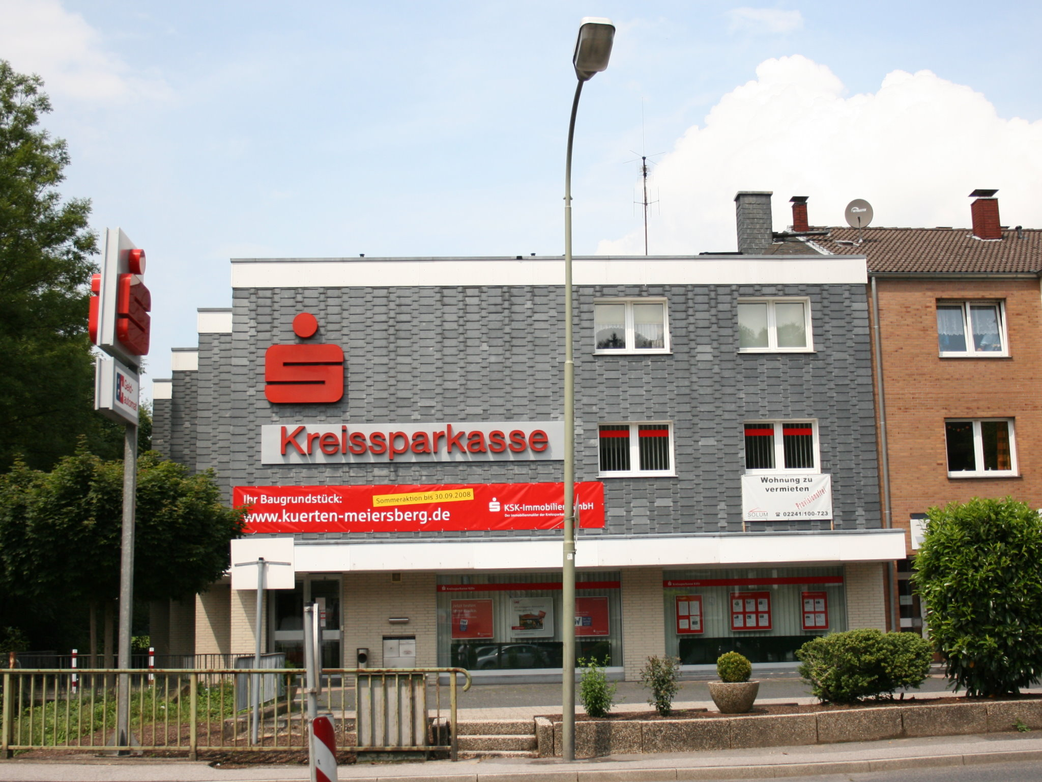 Kürten